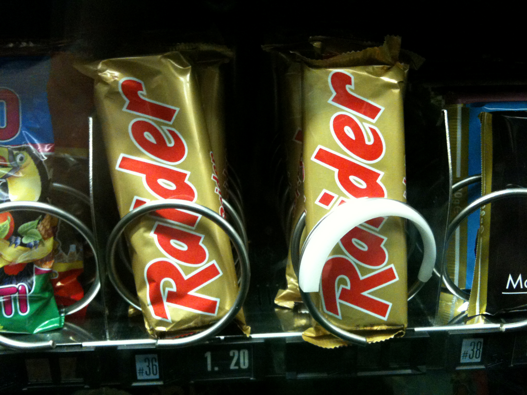 Raider ist der Name des Schokoriegels Twix bis 1991 in Deutschland